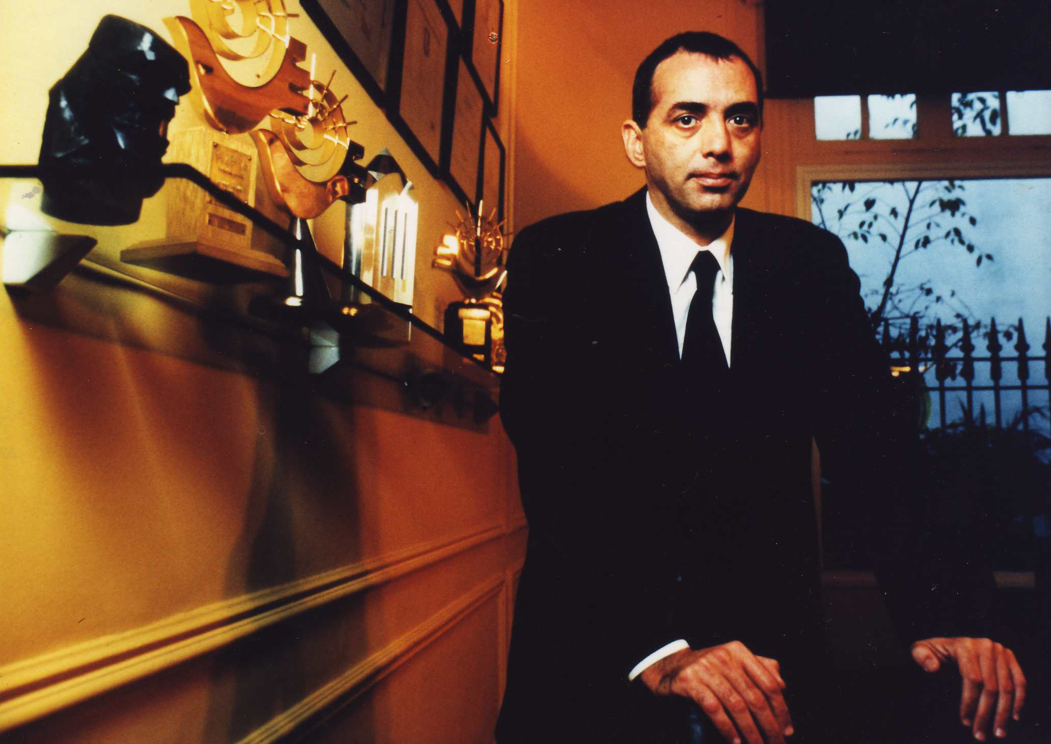 Carlos Souto con premios